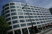 EHESS